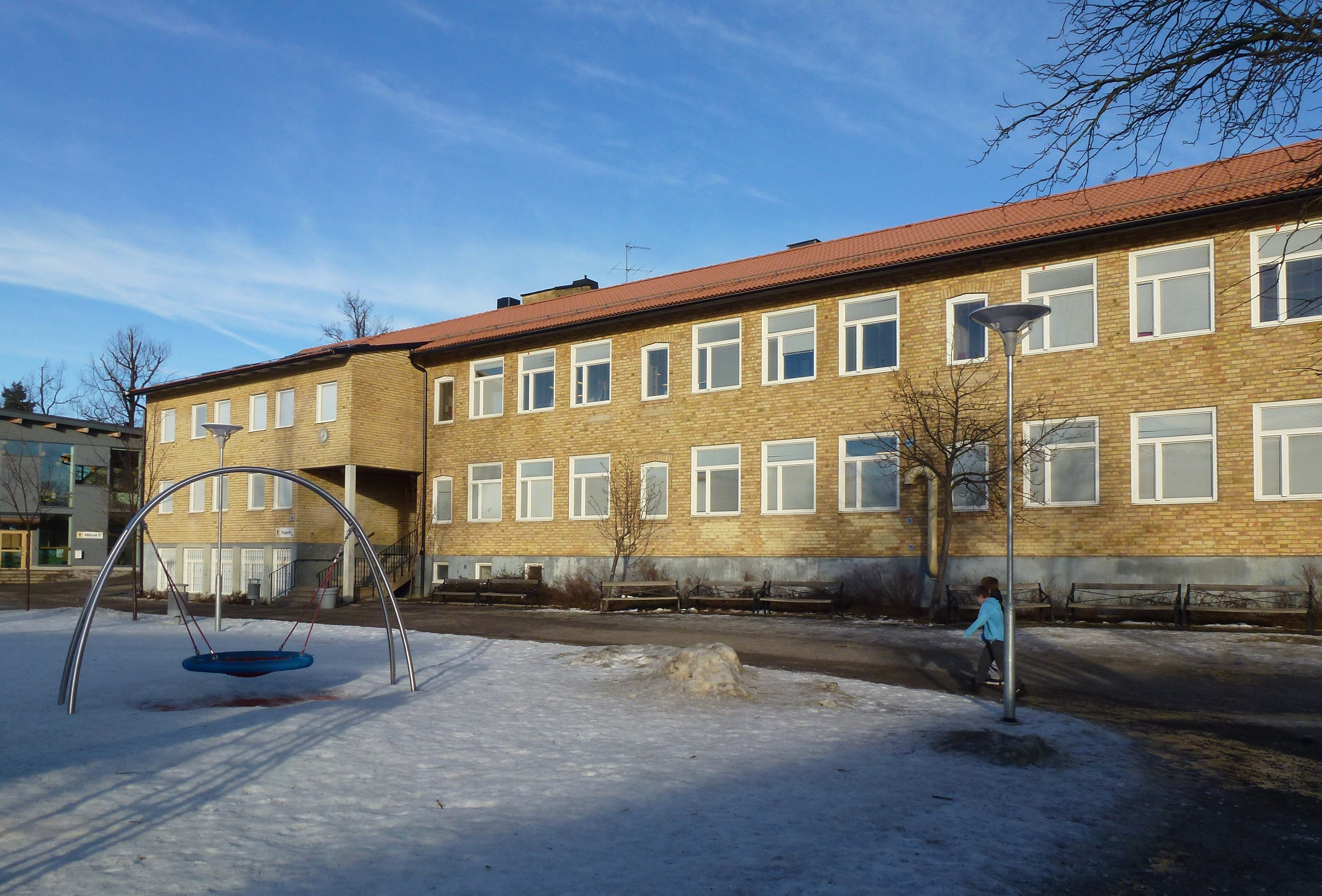 Segeltorpsskolan